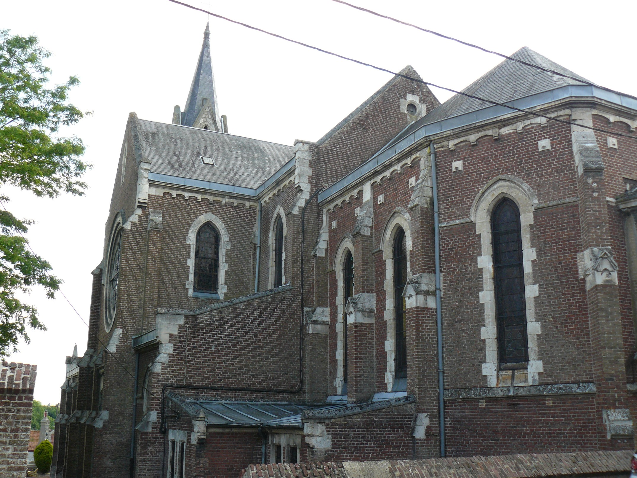 Église de Marœuil